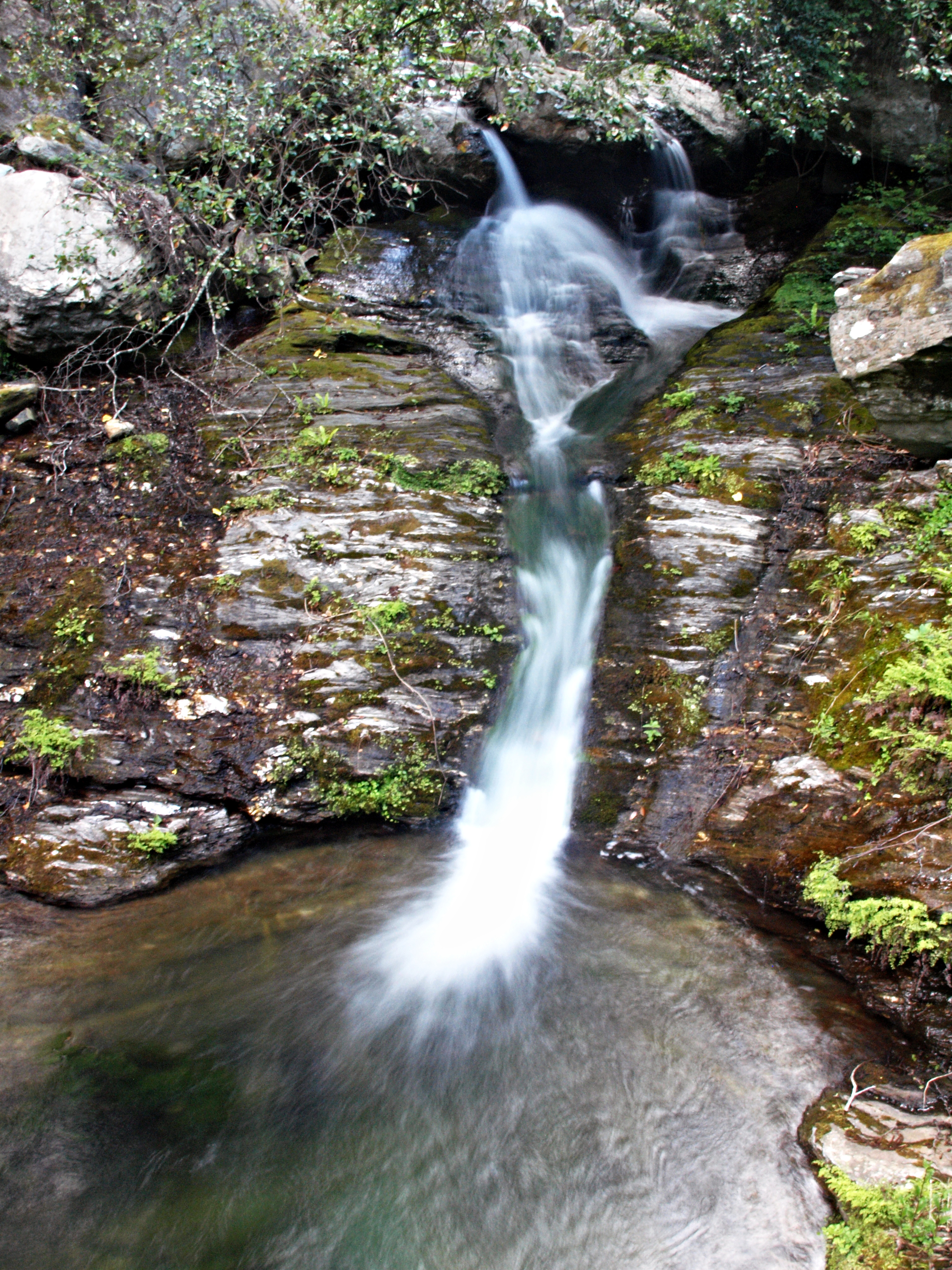 Pietracorbara, Cap Corse (Corse) - Cascade du ruisseau d'Olmo, affluent du ruisseau de Pietracorbara, en amont du pont de la route D32 vers Lapedina